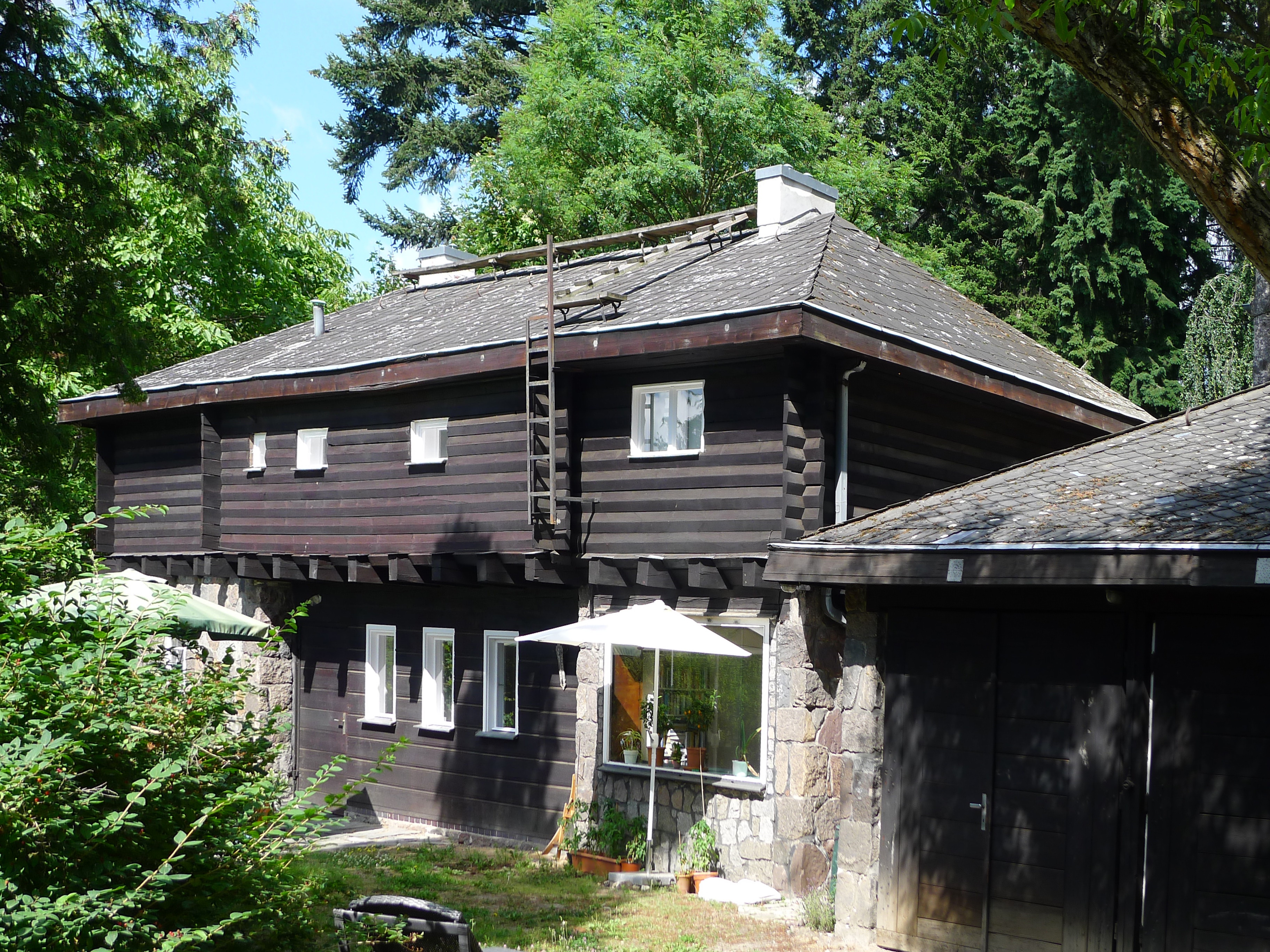 Chauffeurshaus